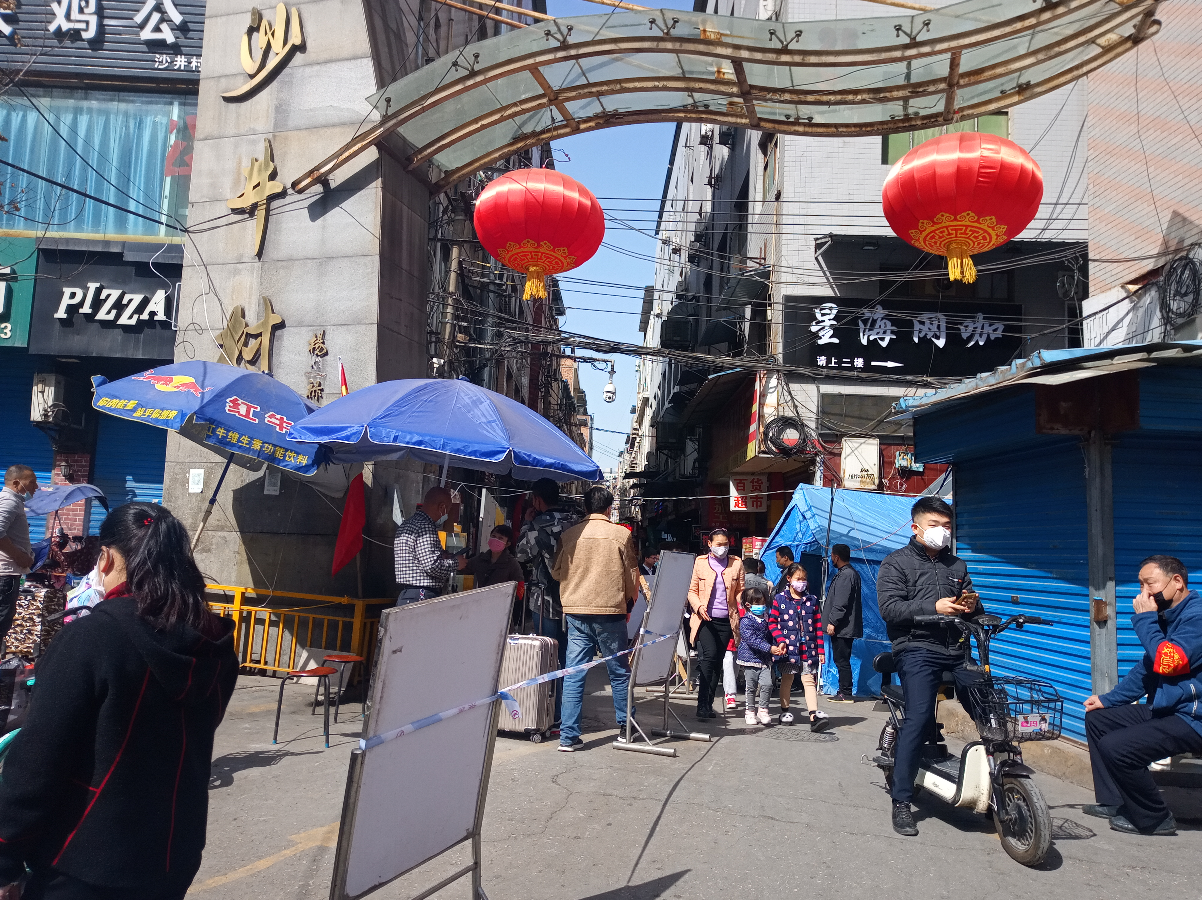 西安市雁塔区沙井村出入口的防疫检查，现在可以扫描健康码出入。